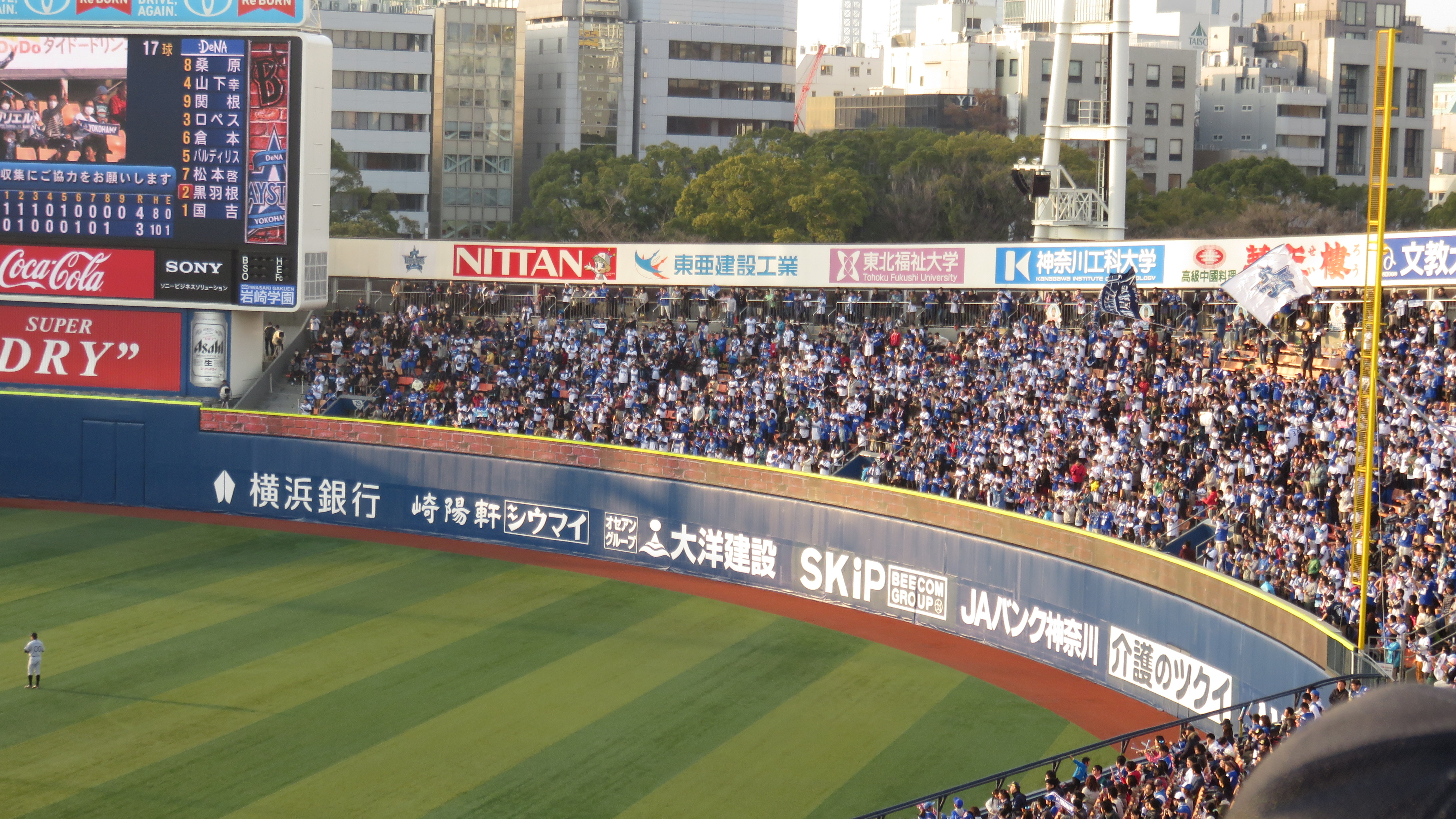 横浜スタジアムのライトスタンドの様子